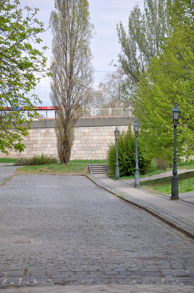 the end of Lajos Street, Budapest District III